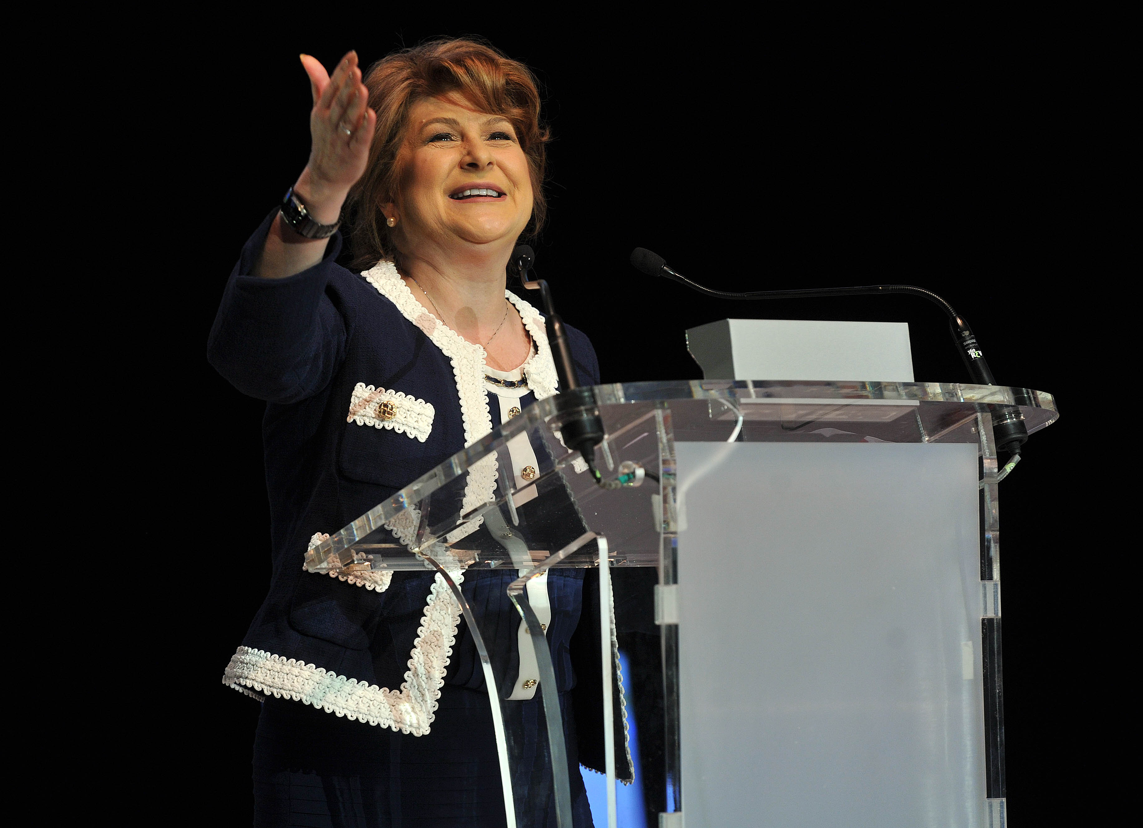 2. Rovana Plumb la reuniunea OFSD, Primavara social democrata - 08.03.2014 (2)